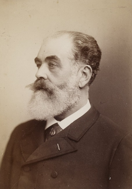 Portrait d'Alfred Rabaud (1828-1886) de la maison de commerce Rabaud Frères de Marseille. Alfred Rabaud, consul de Zanzibar et consul de Madagascar à Marseille, fut l'instigateur et le premier president de la Société de géographie de Marseille en 1877. Il fut aussi l'âme dirigeante du projet de développement de Cheikh Saïd. Photographie de Nadar prise en 1883.